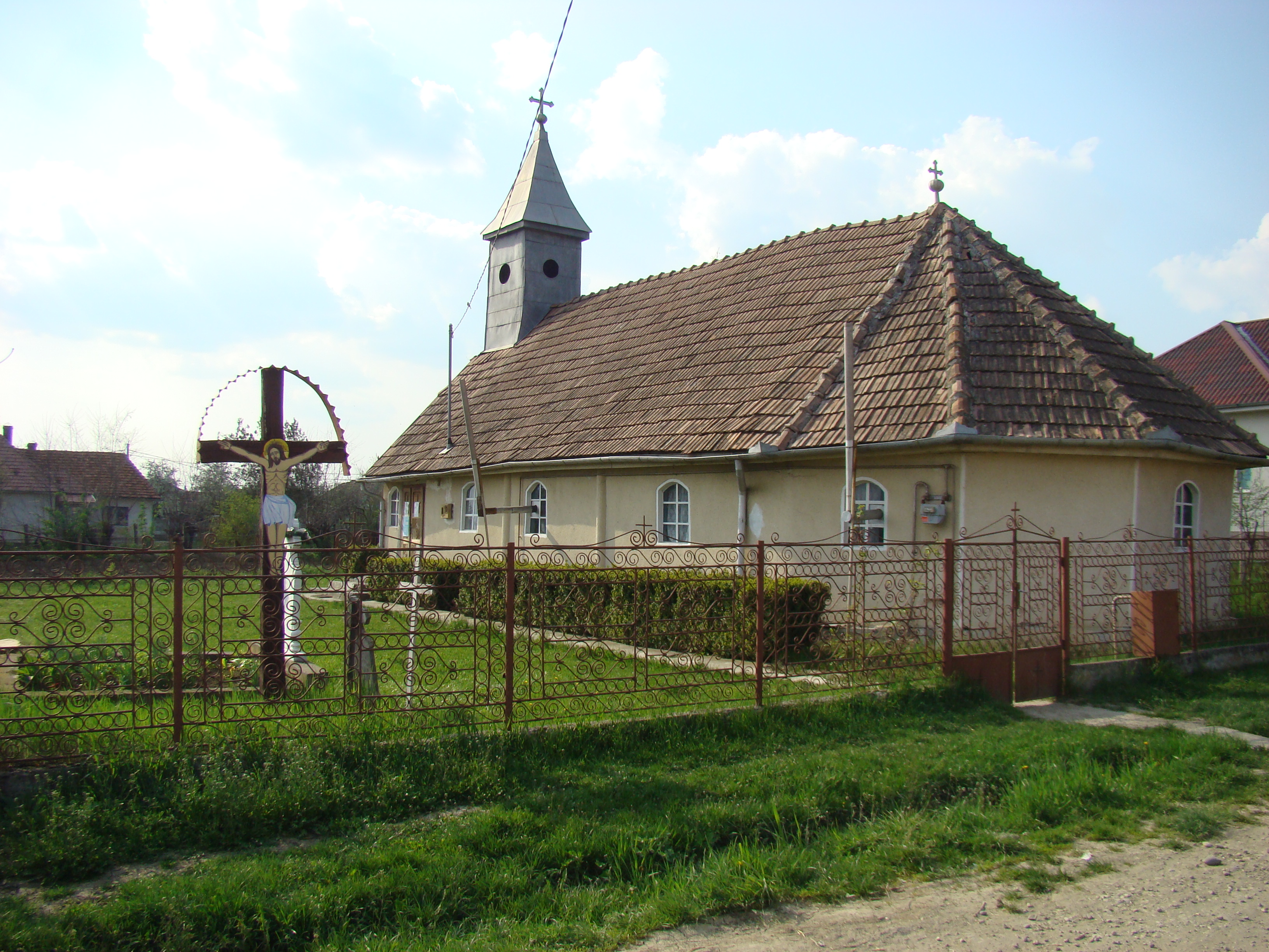 Biserica de lemn, sat aparţinător SFÂNTU GHEORGHE; oraş IERNUT